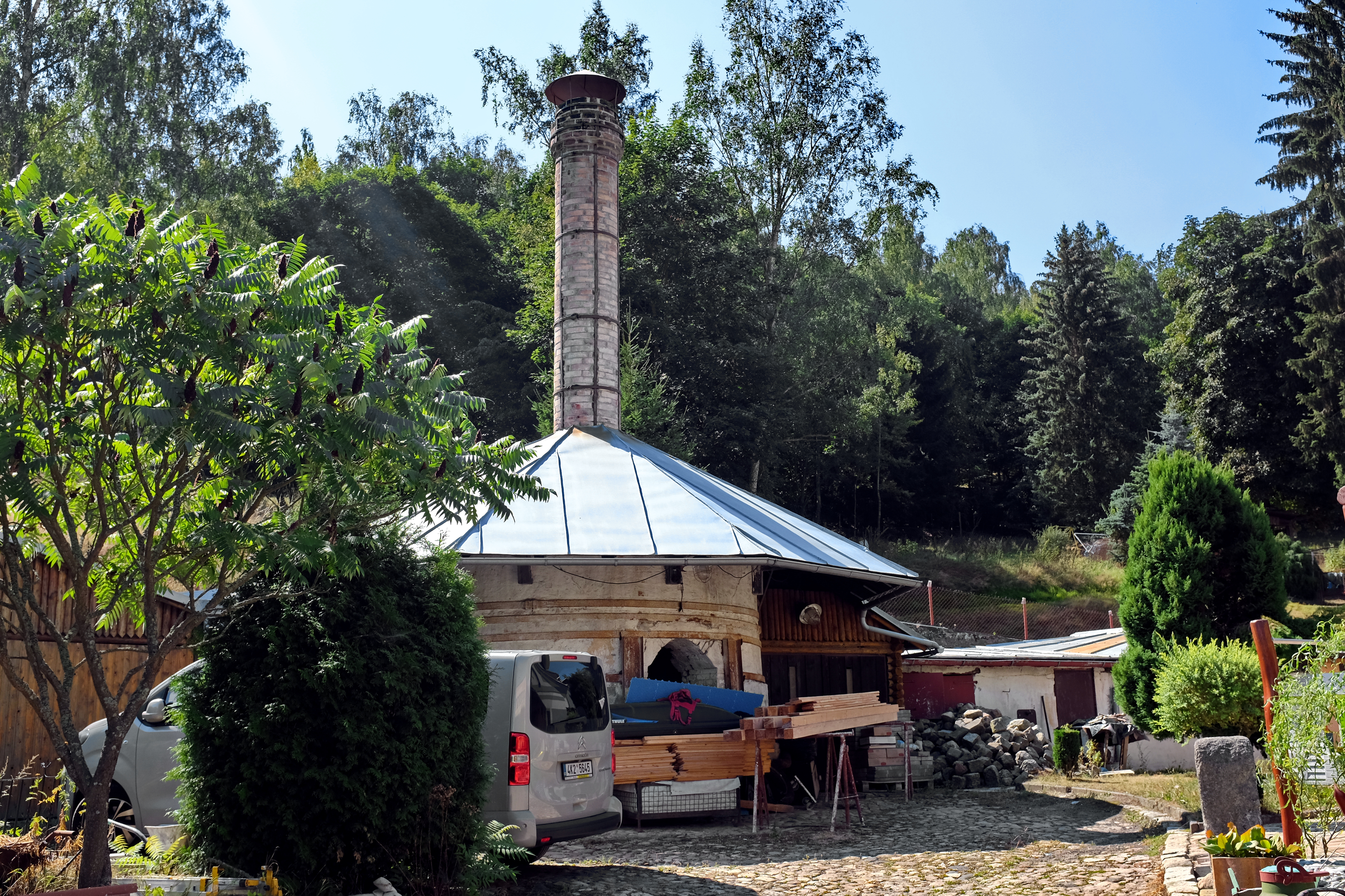 Kalcinační pec, Tovární, při domu č. 200/25, parc. 566/1, Loket (okres Sokolov).